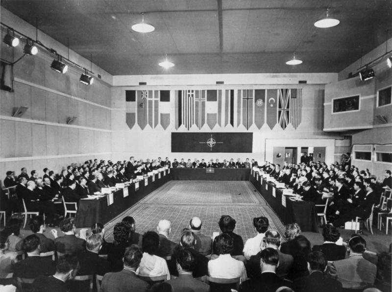 Aufnahme der BRD in die NATO-Gemeinschaft Konferenz in Paris Mai 1955